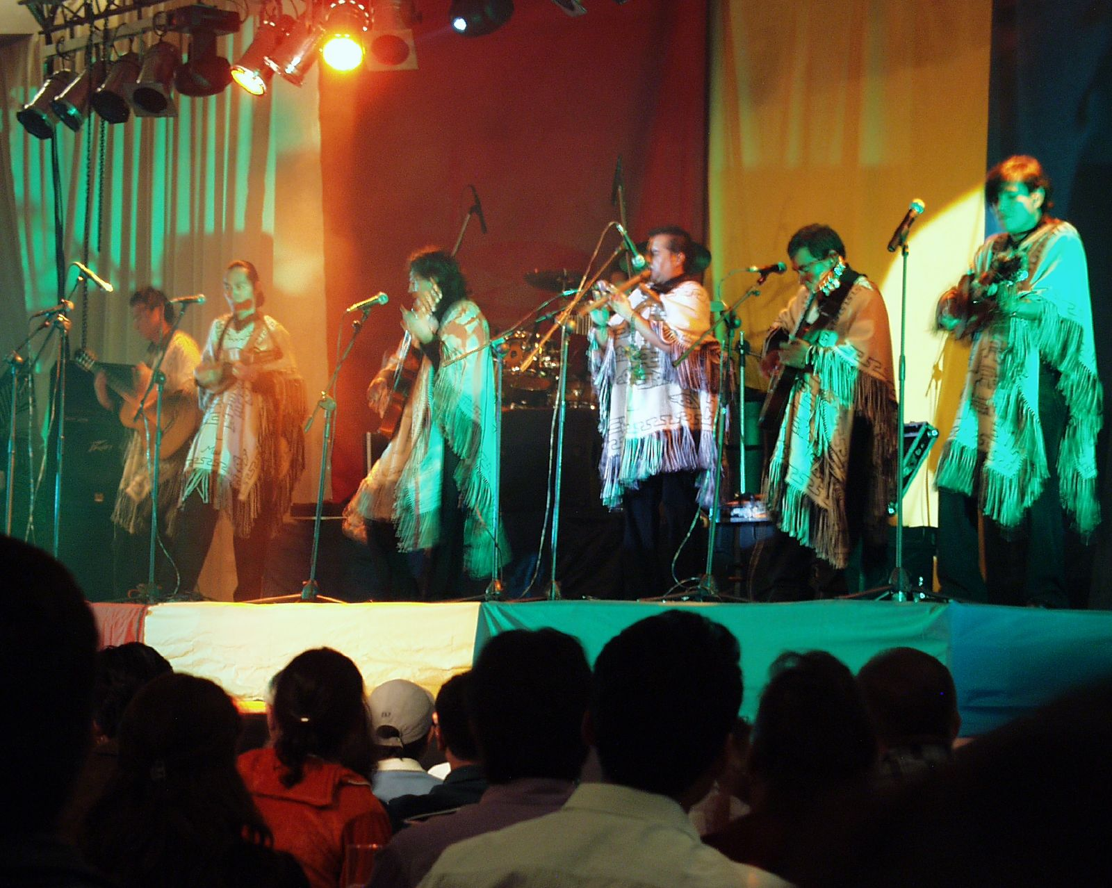 Los Kjarkas, grupo folklórico boliviano.